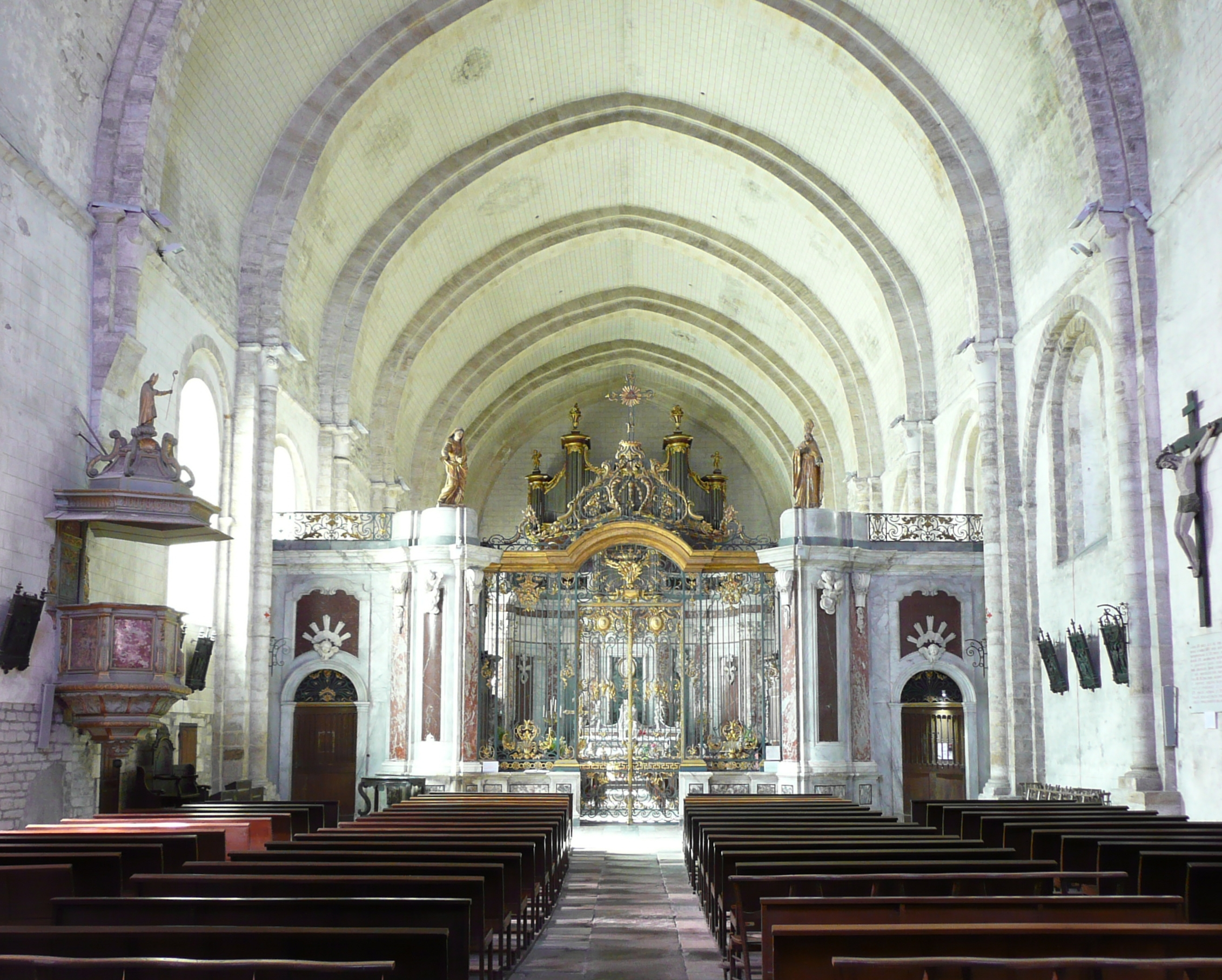 Intérieur de la cathédrale St Pons de Cimiez à Saint-Pons-de-Thomières(Hérault)